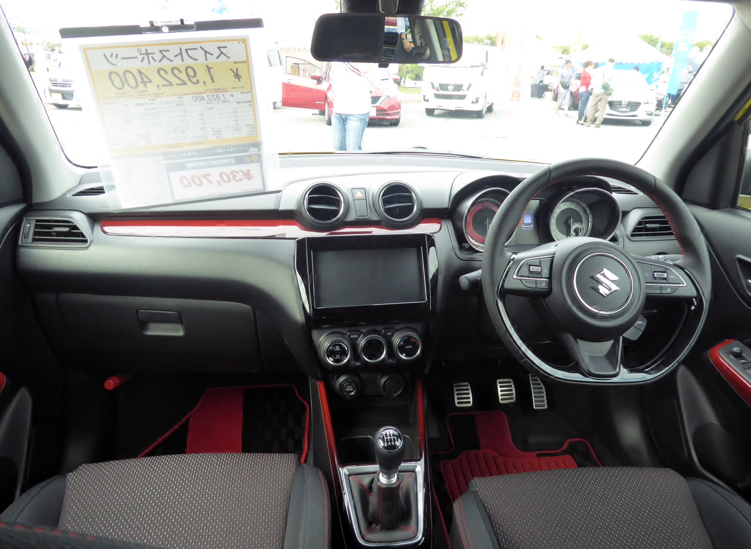 CBA-ZC33S-VBRM-J型スズキ・スイフトスポーツのインテリアを撮影。